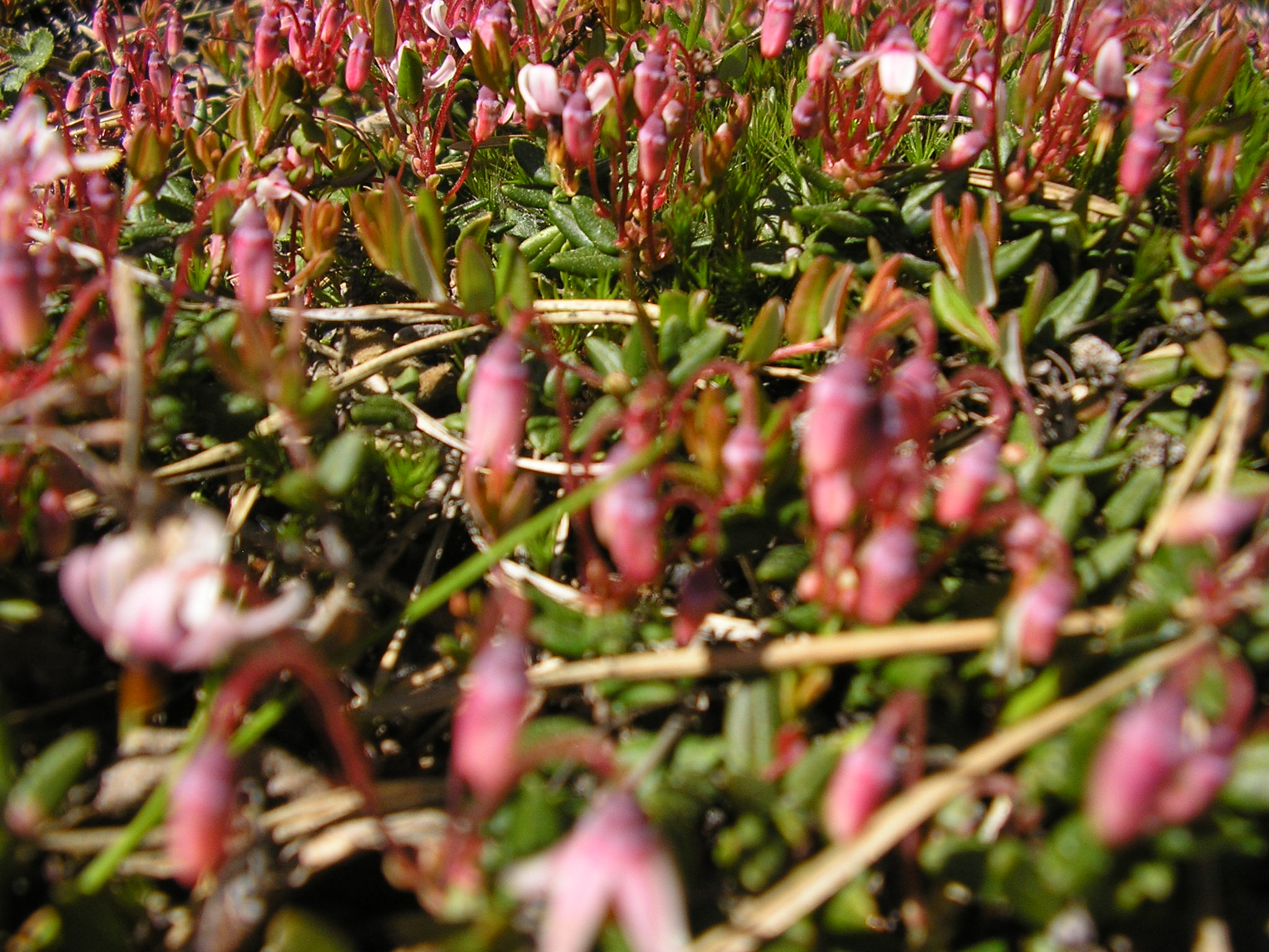 Õitsev harilik jõhvikas (Oxycoccus palustris)